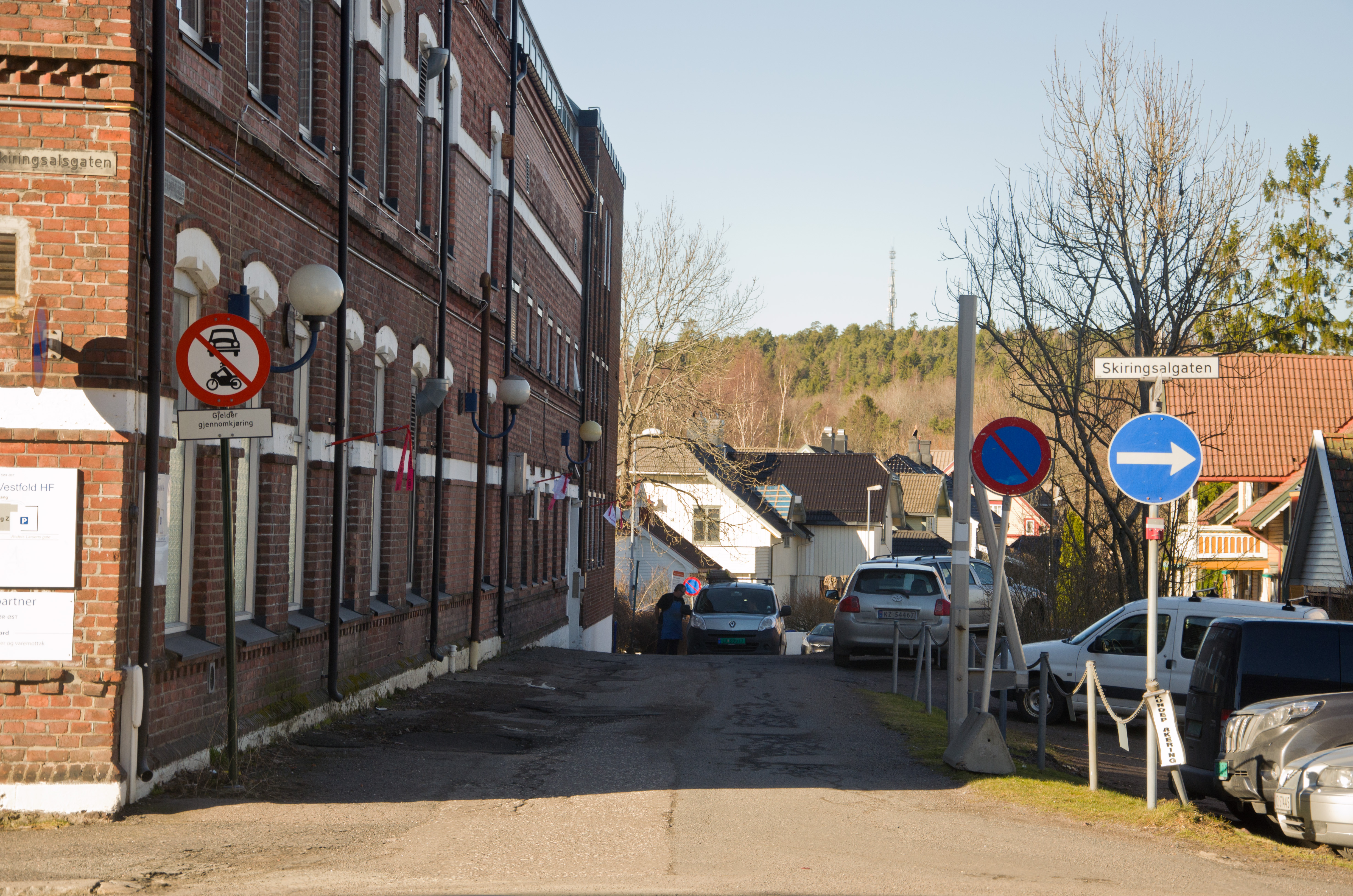 Anders Larsens gate, Tønsberg. Th. Marthinsen Sølvvarefabrikk